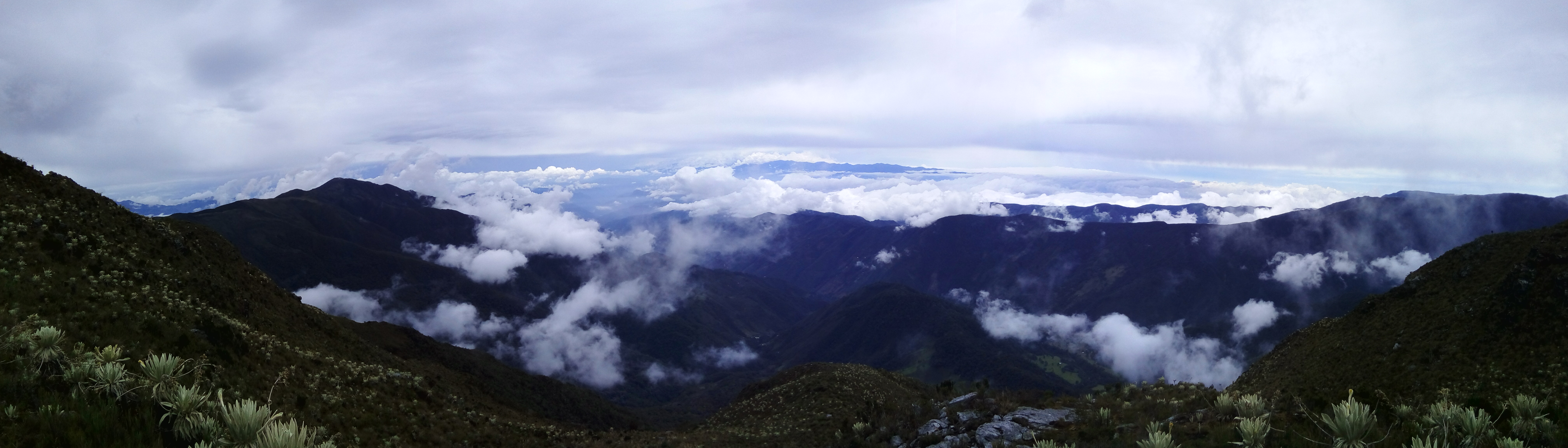 Vista Páramo de Santurban entre Santa Barbara y Guaca Santander.